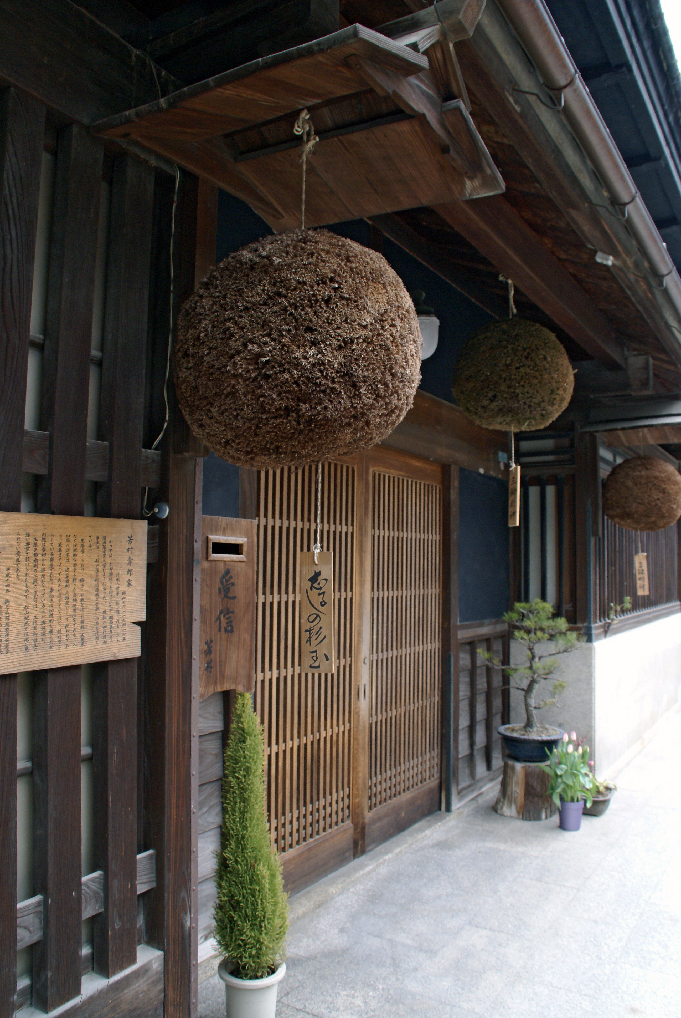 Yoshimura syuzou Matsuyama in Uda, Nara prefecture, Japan